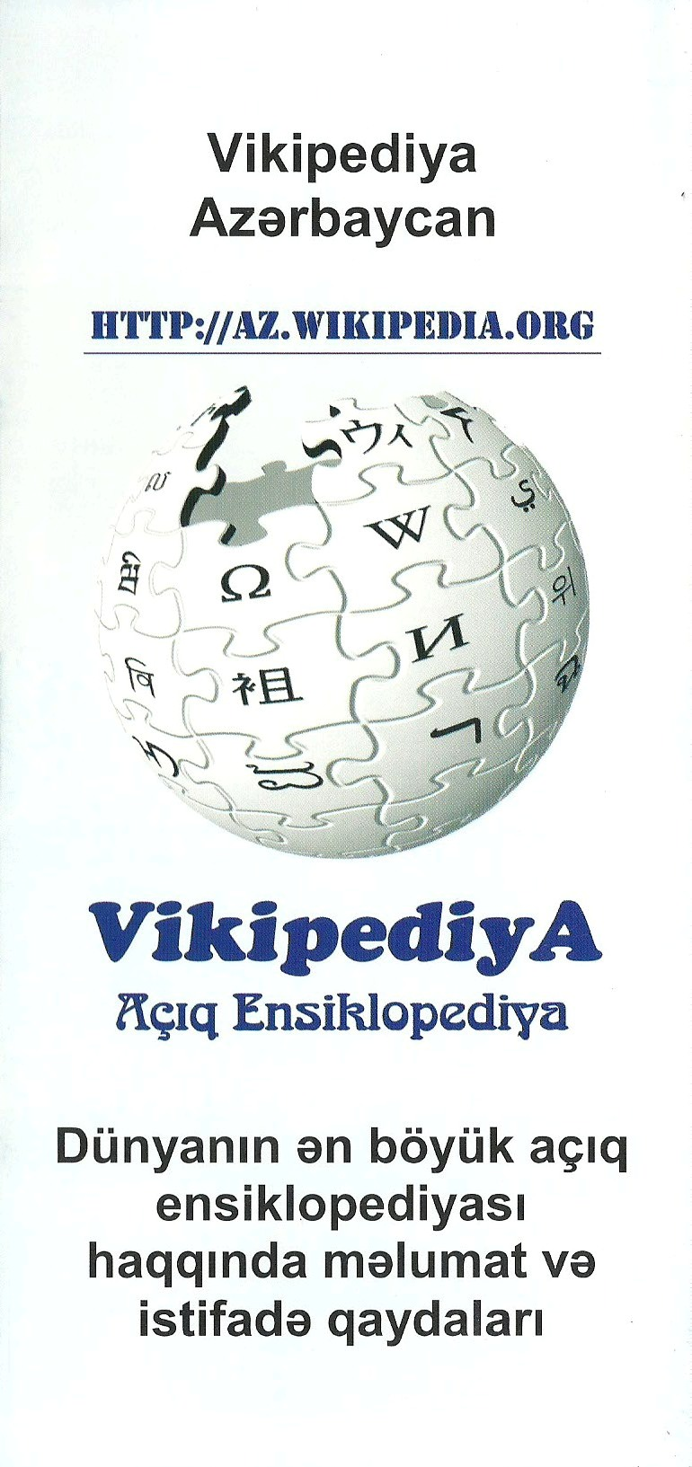 Vikipediya-Azərbaycan İB-nin ilk bukleti